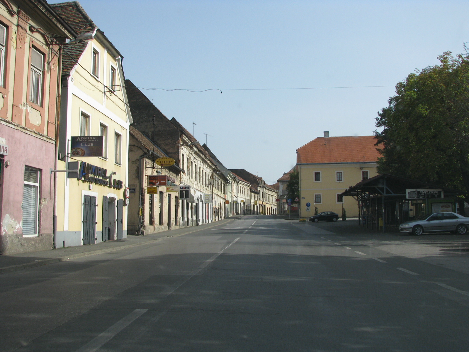 Ulica u Petrinj